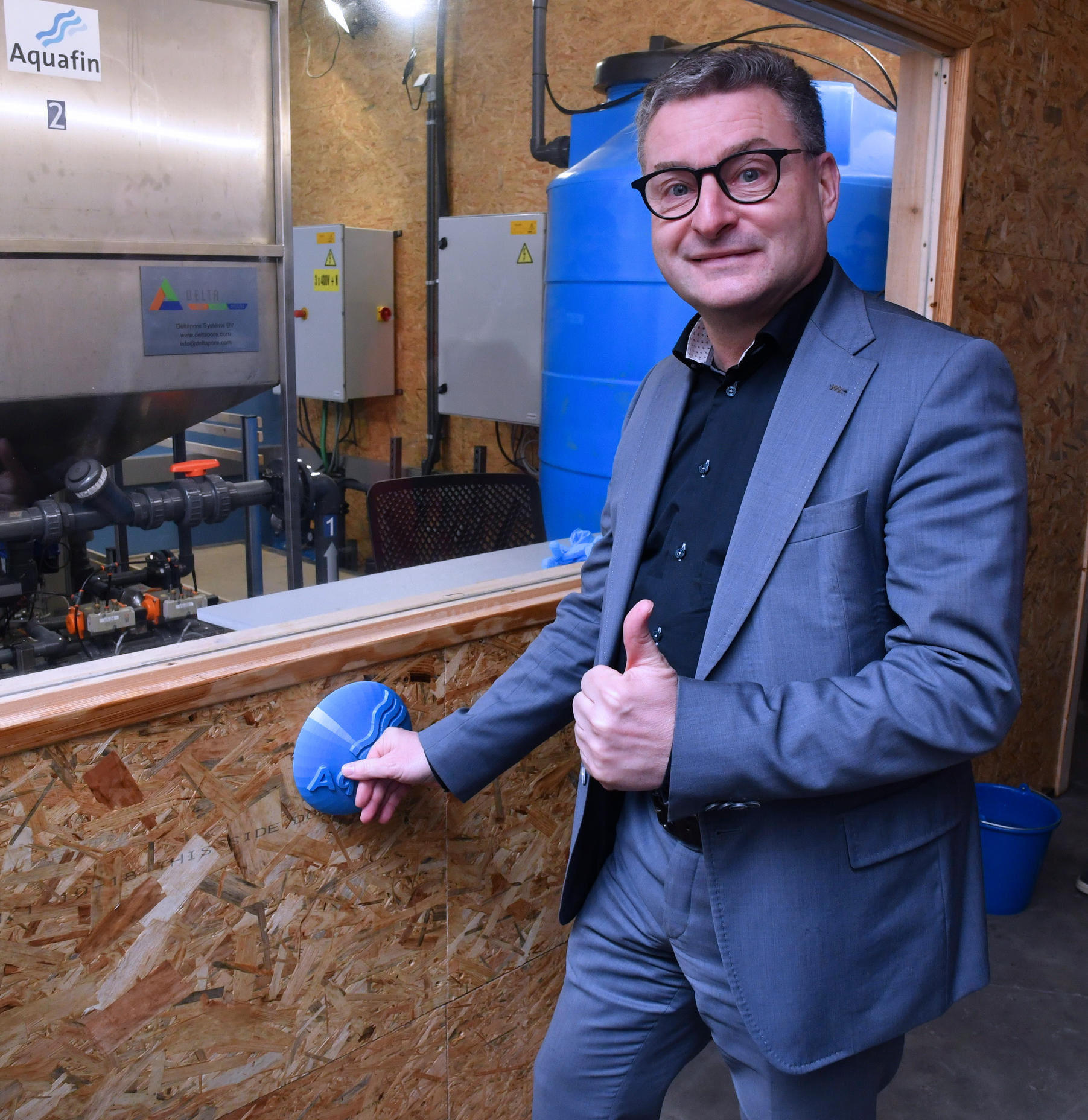 Koen Van den Heuvel tijdens de opening van een experimentele waterzuiveringsinstallatie in Vilvoorde.